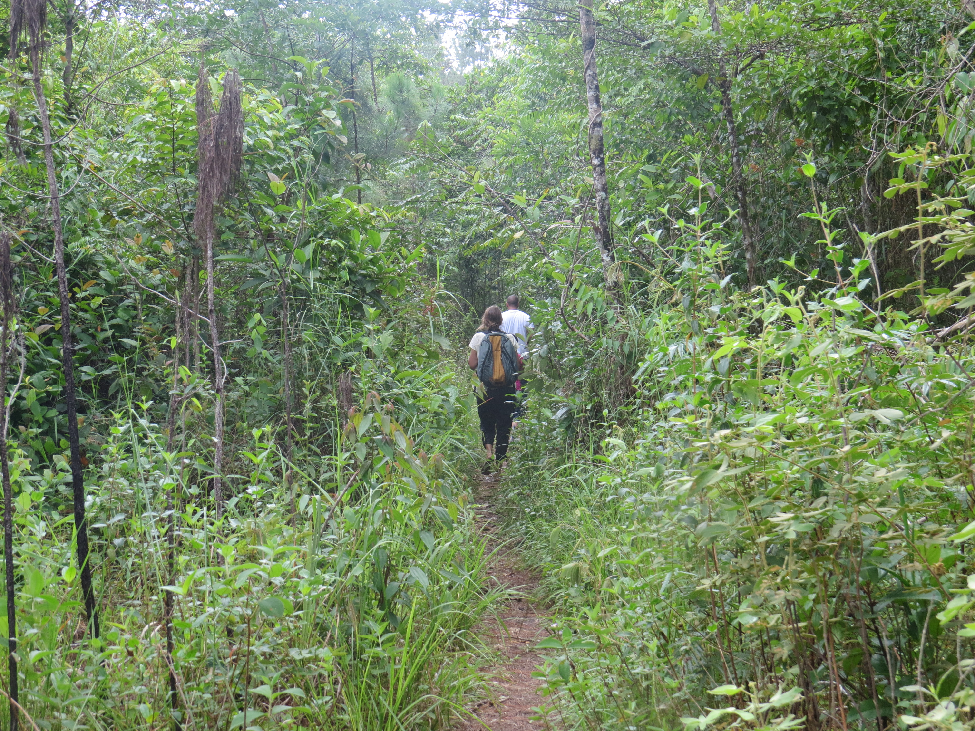 Finca BAWISA a 25 kilómetros de Waspam, Rio Coco. Nicaragua